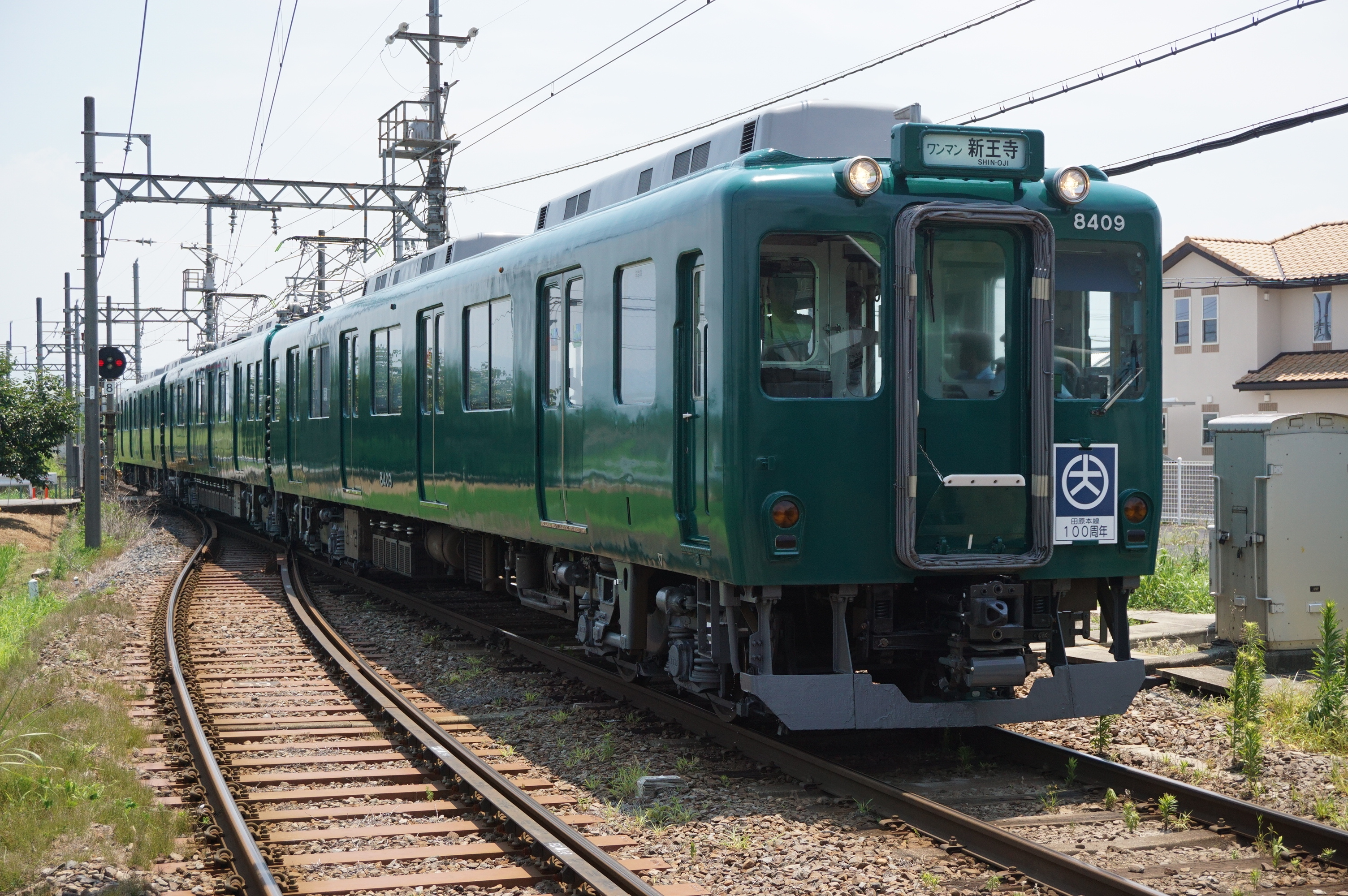 田原本線開業100周年記念復刻塗装車（8409F・グリーン色） Sony ILCE-6000